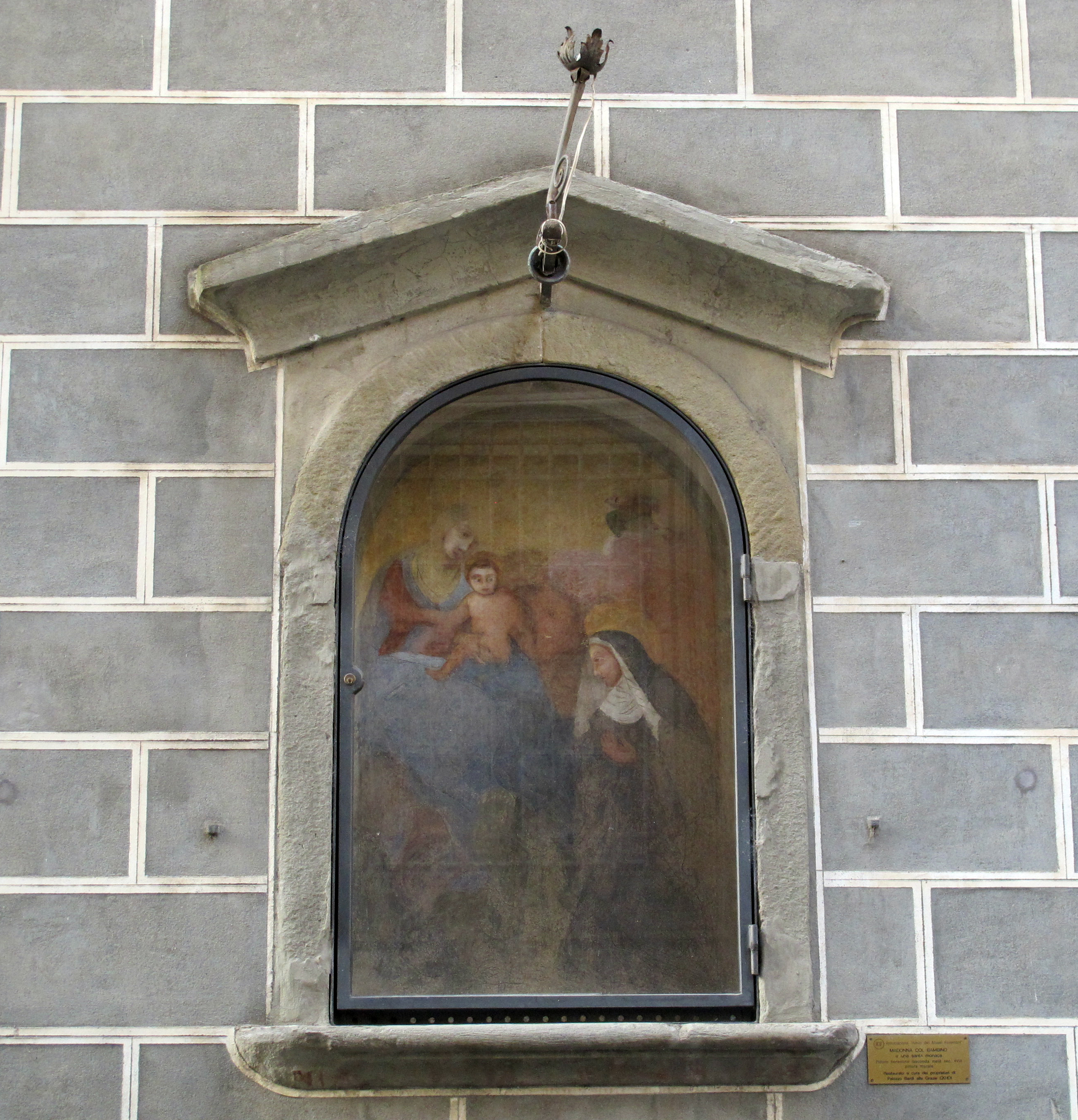 Palazzo bardi serzelli, tabernacolo su via malenchini, pittore fiorentino della seconda metà del XVIII sec